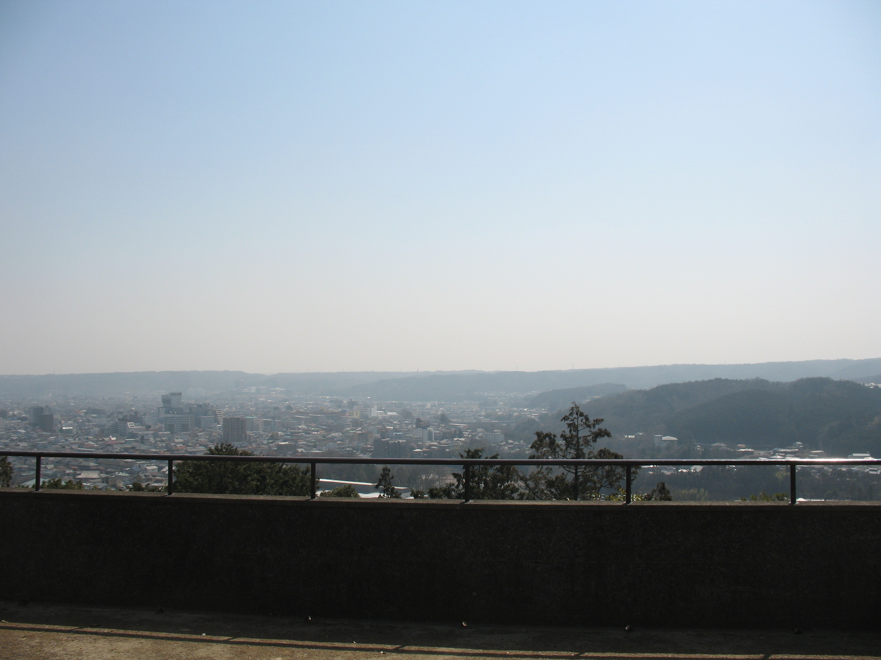 飯能市天覧山の山頂